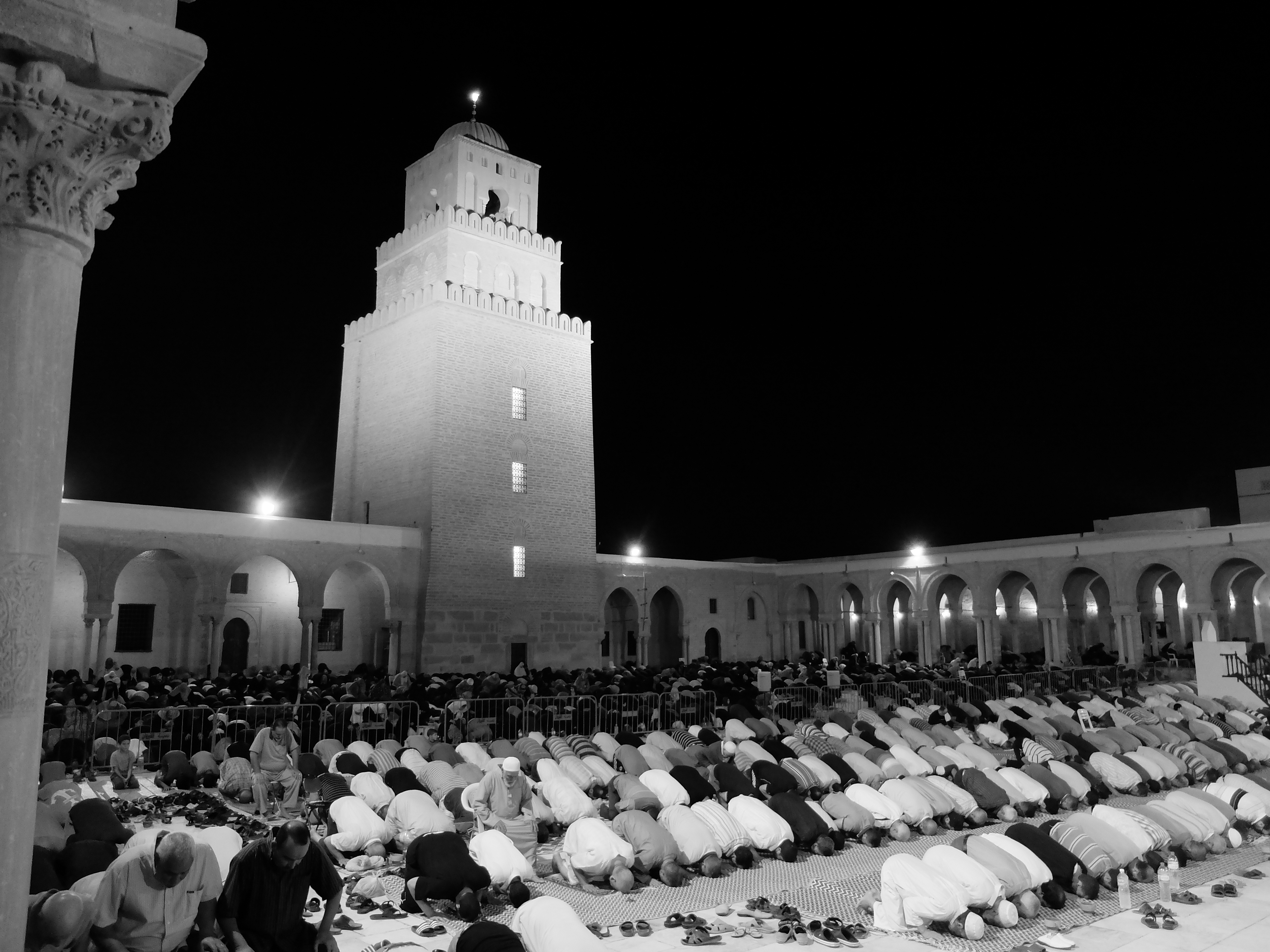 Grande Mosquée (Sidi Okba). Fidèles musulmans se prosternant dans la cour de la Grande Mosquée de Kairouan, en Tunisie.